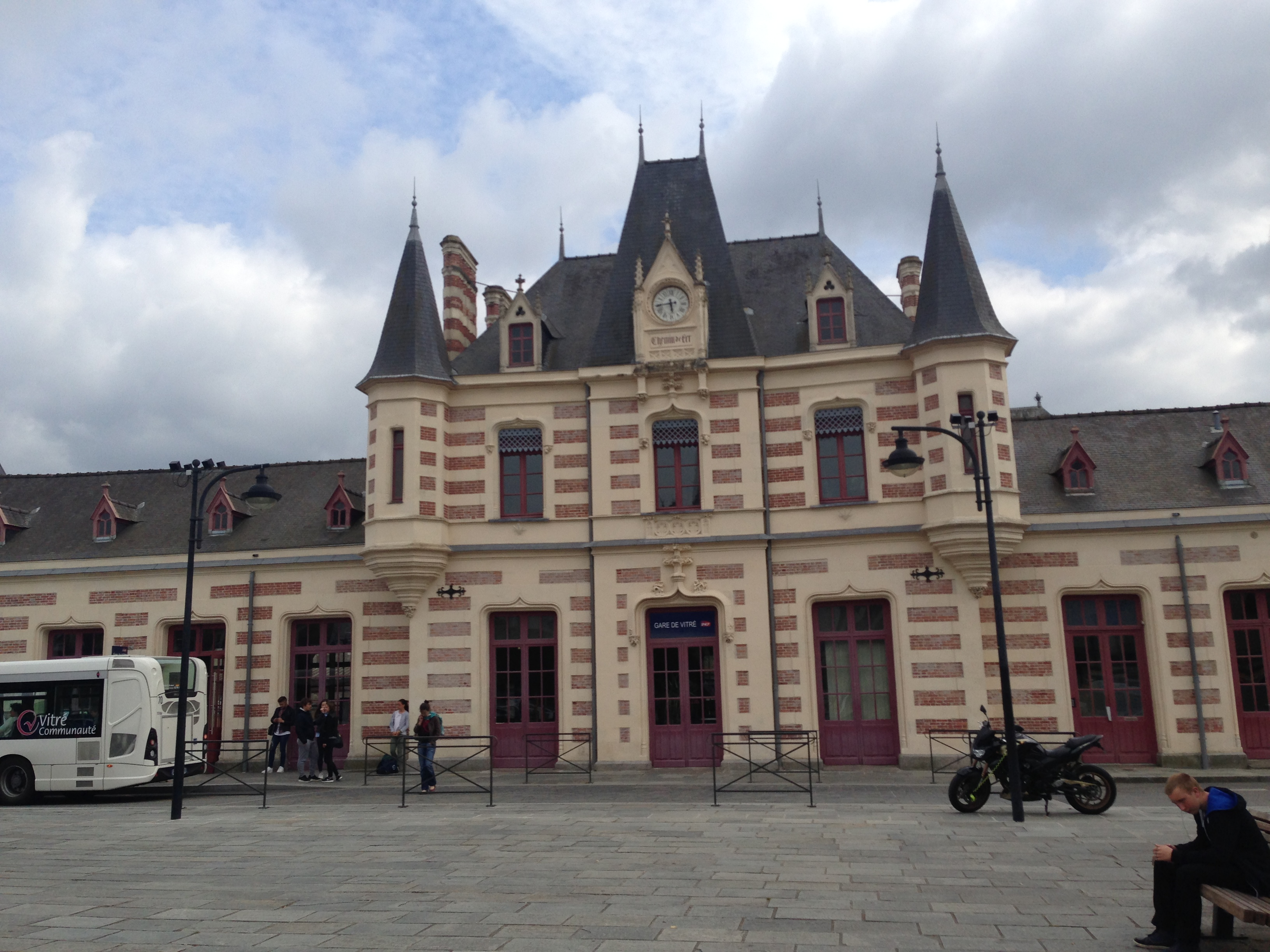 Gare de Vitré en 2015